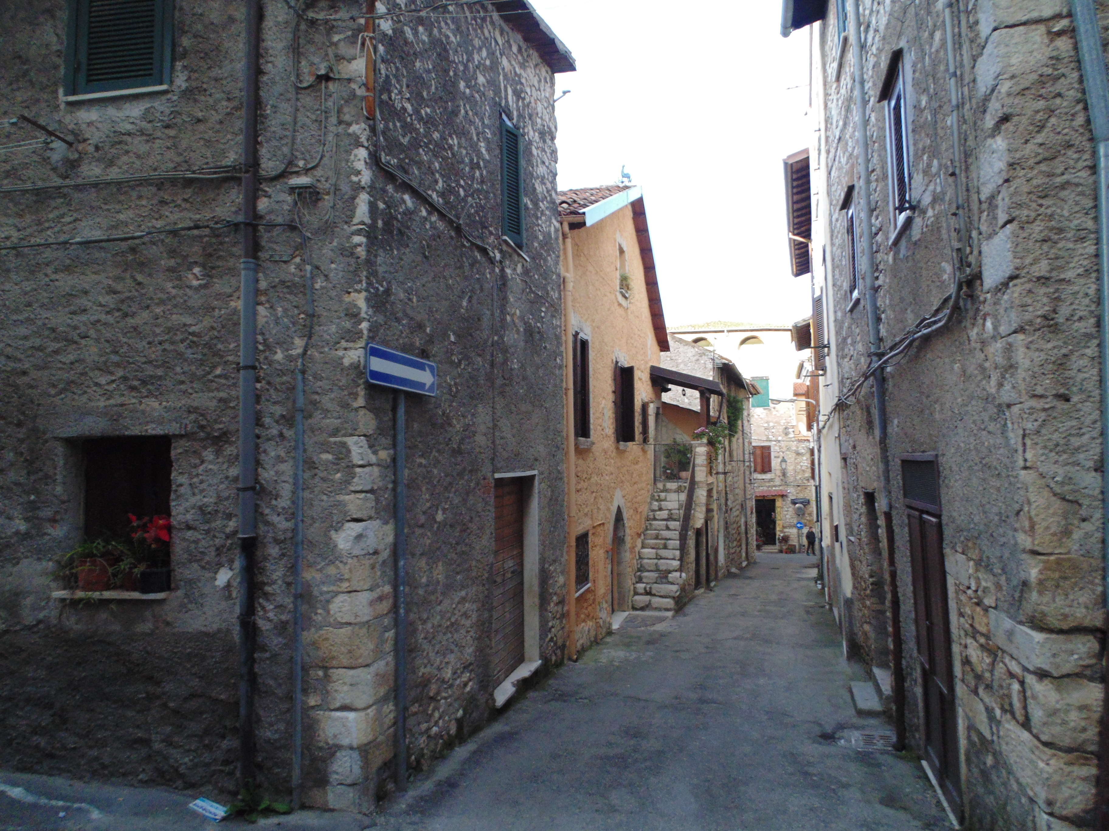 04018 Sezze LT, Italy